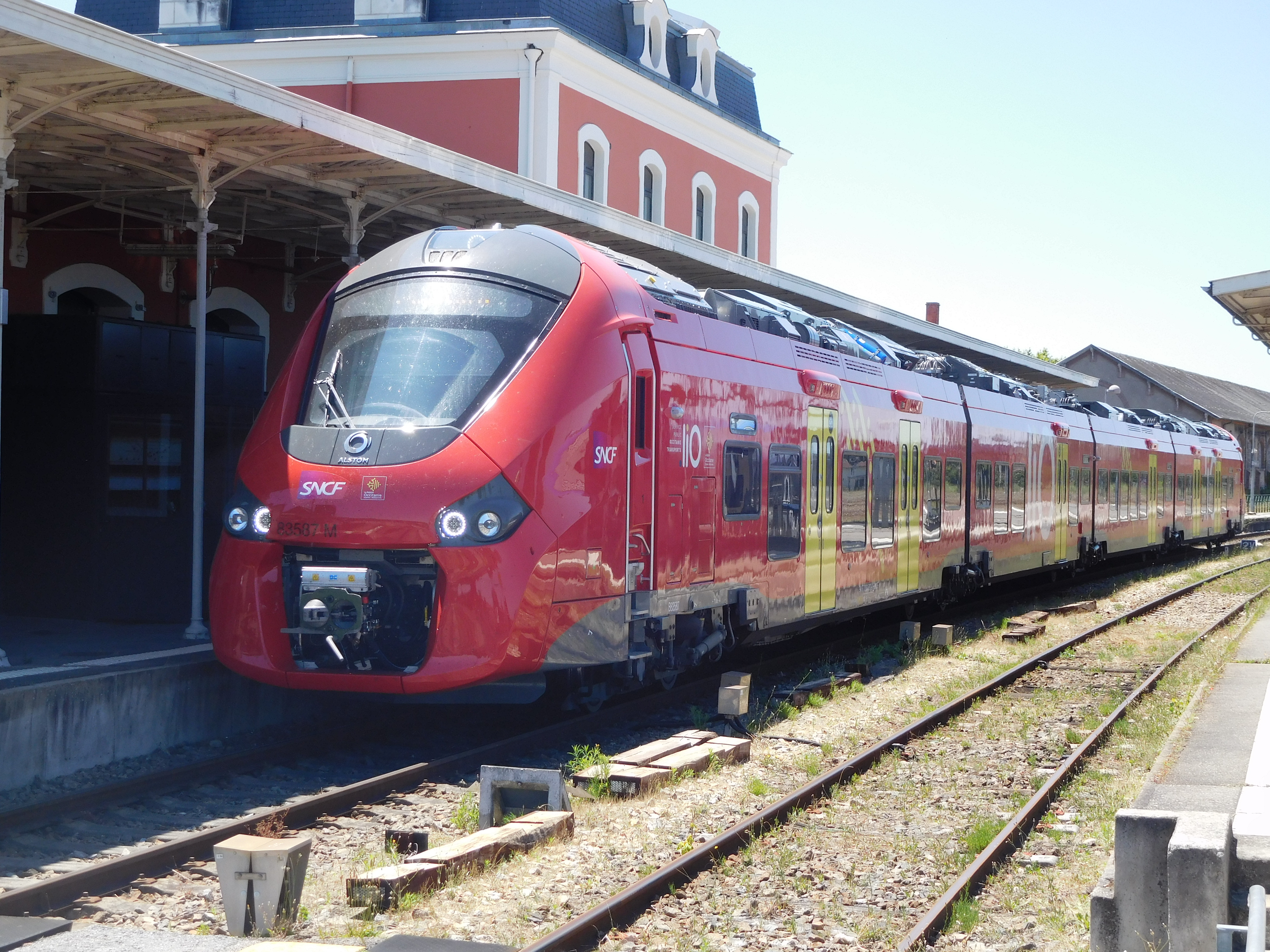 Régiolis aux nouvelles couleurs LiO stationné en gare d'Albi-Ville.